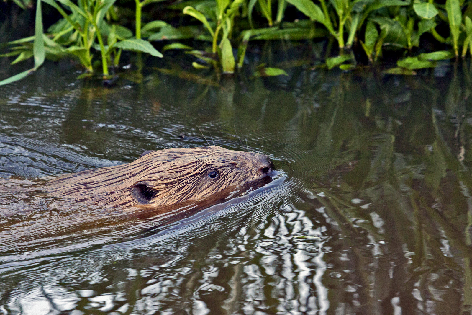 Bever This is a photo or sound file made in Drentsche Aa National Park in the Netherlands, with the main subject of the file in the category: animals